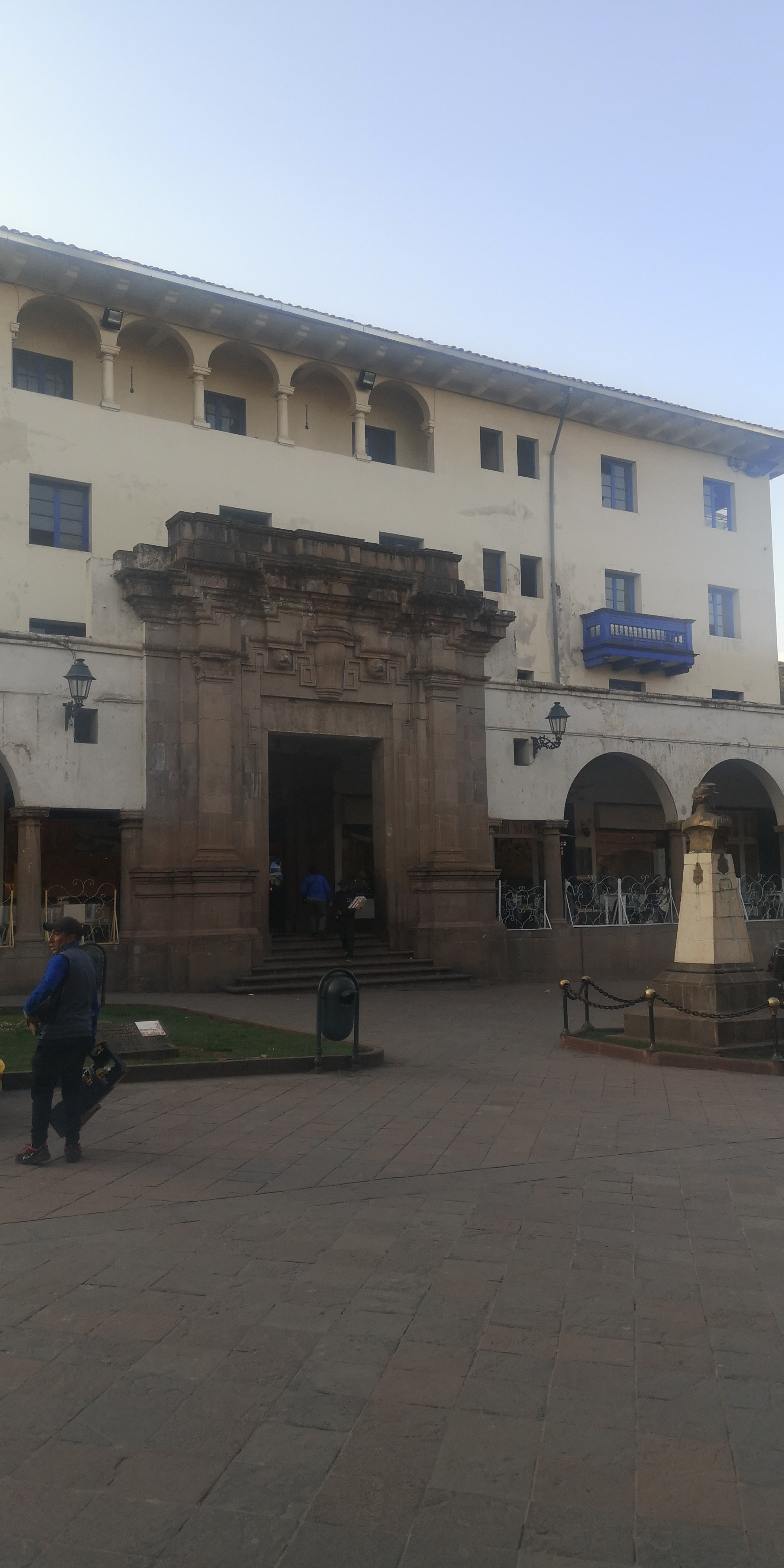 Frontis del Hotel Cusco que da a la Plazoleta Espinar